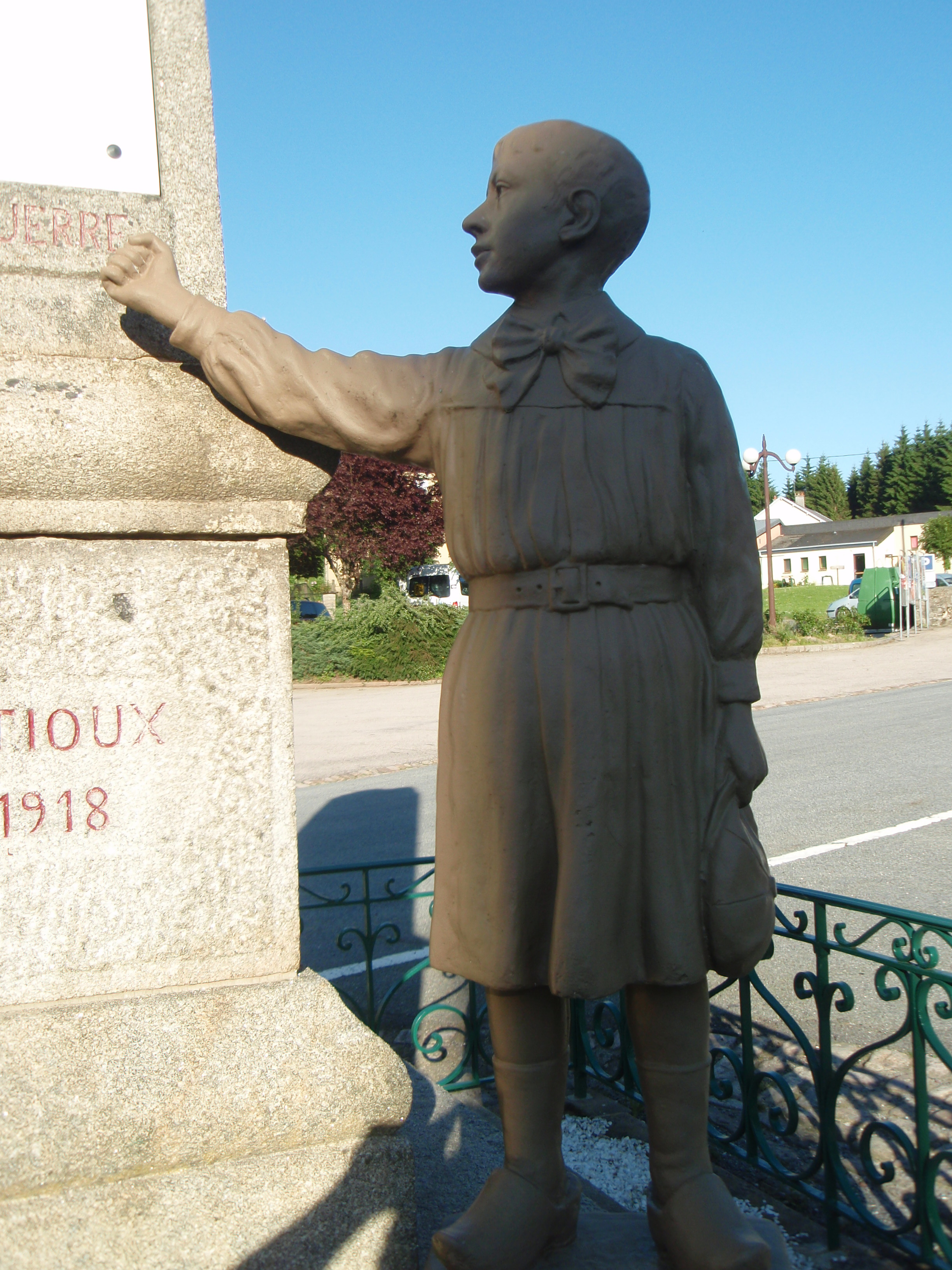 Monument aux morts pacifiste de Gentioux (Creuse)